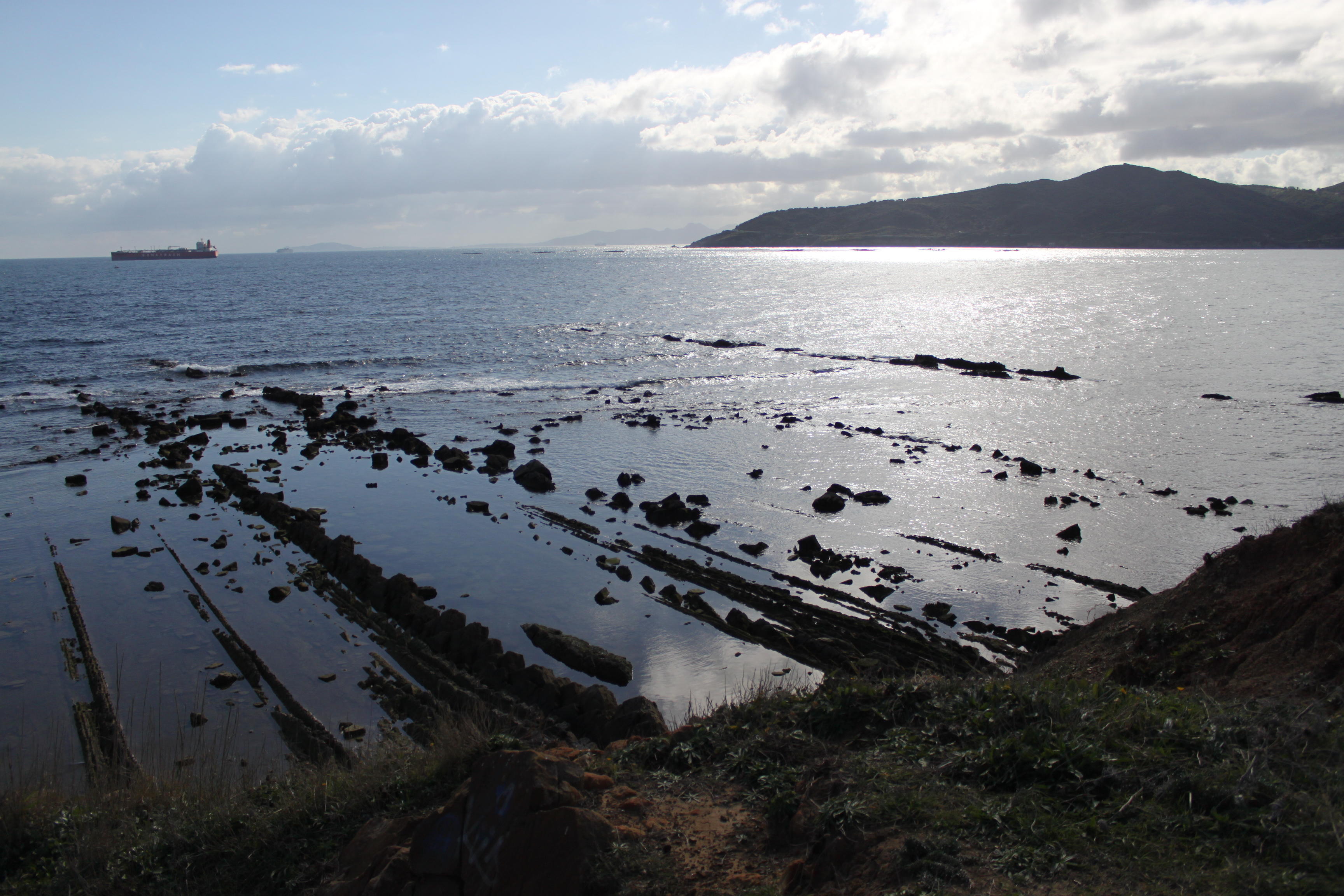 Punta Carnero desde la punta de San García, bahía de Algeciras, Andalucía, España